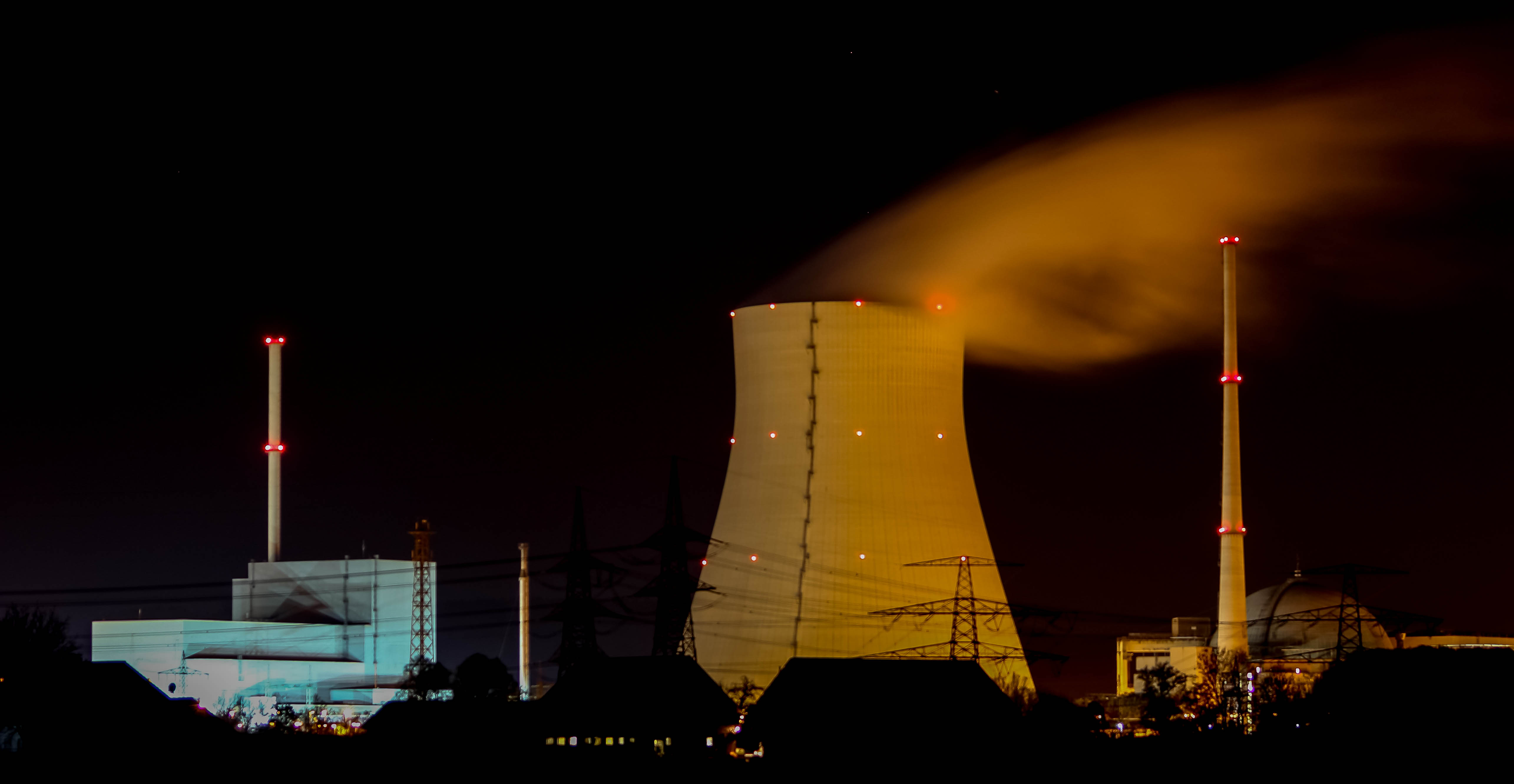 Block 1 & 2